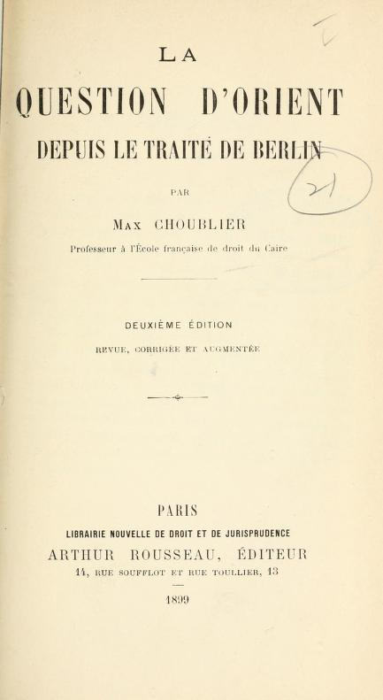 Корицата на книгата "La question d'Orient depuis le traité de Berlin" от Макс Шублие